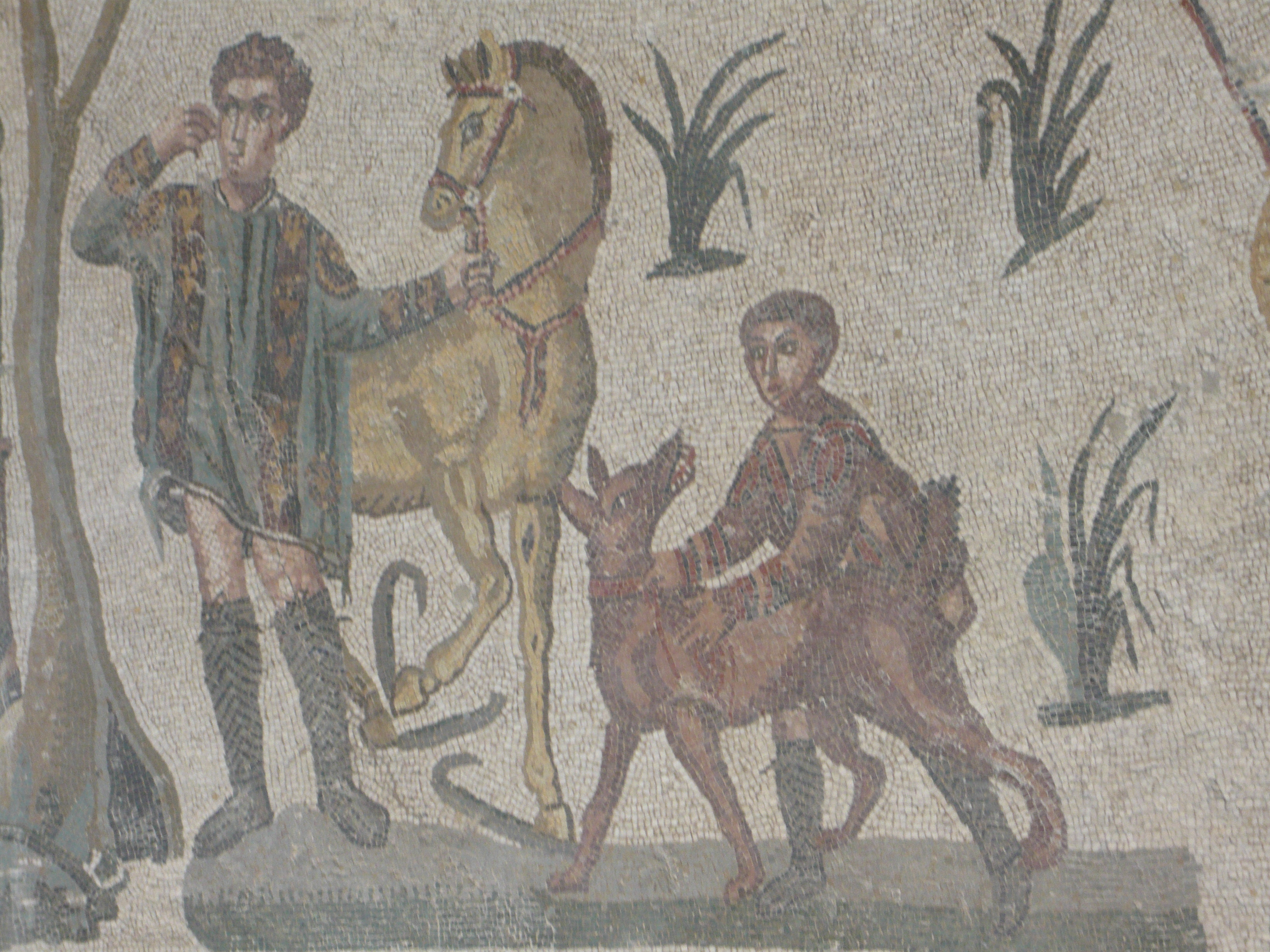 scène de chasse avec Cirneco dell'Etna mosaïque de la villa Casale dei Sarraceni